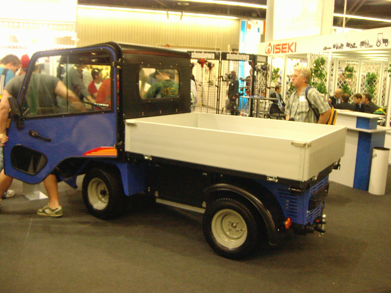 Iseki op het GalaBau in Nürnberg